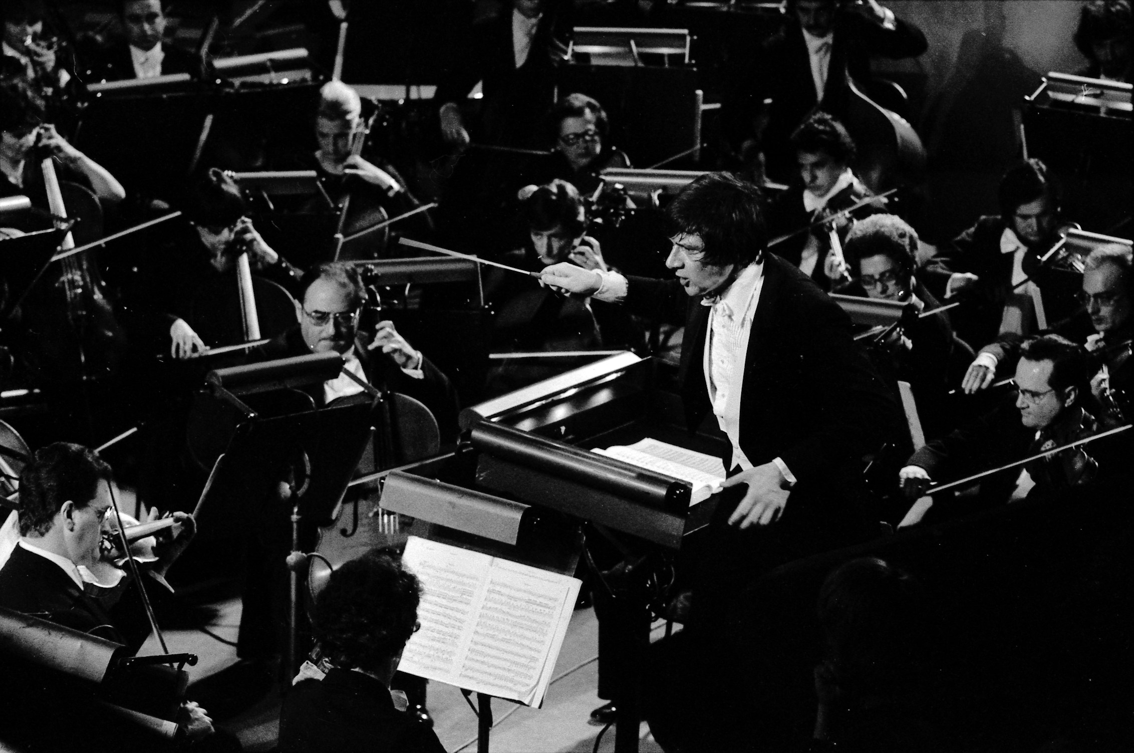 Halle aux Grains à Toulouse. Le 11 Décembre 1977. Vue d'ensemble en plongée d'une partie de l'ochestre du capitole, avec en son centre le chef d'orchestre Michel Plasson dirigeant l'opéra "Fidélio" de Ludwig Van Beethoven.